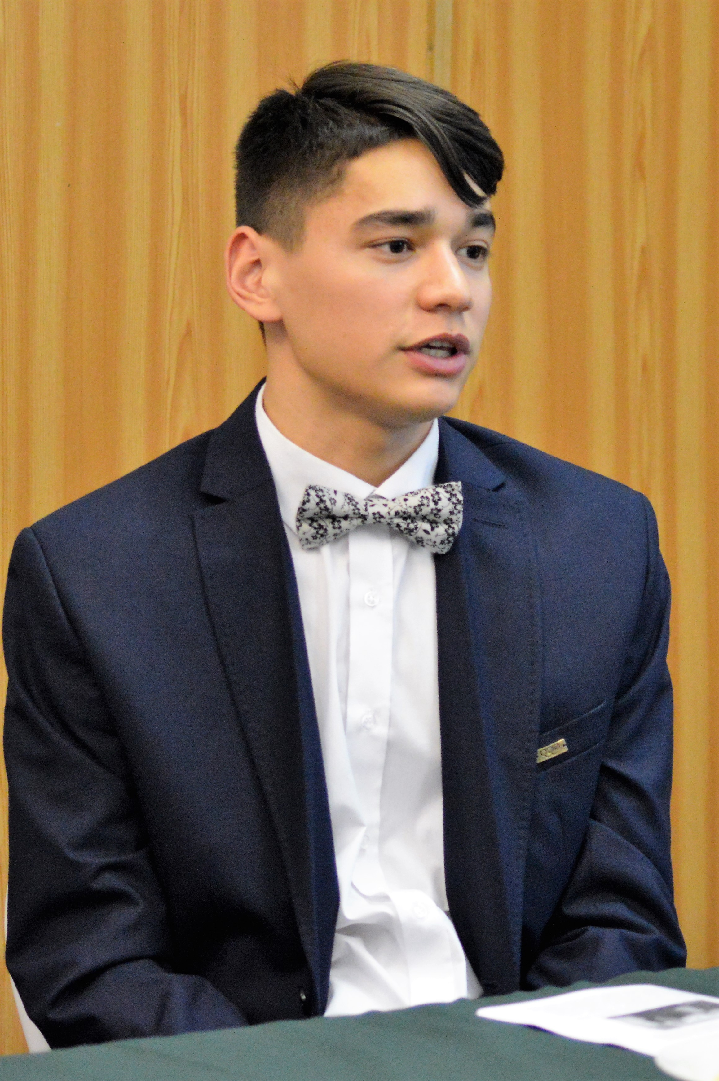 Liu Shaolin Sándor rövidpályás gyorskorcsolyázó